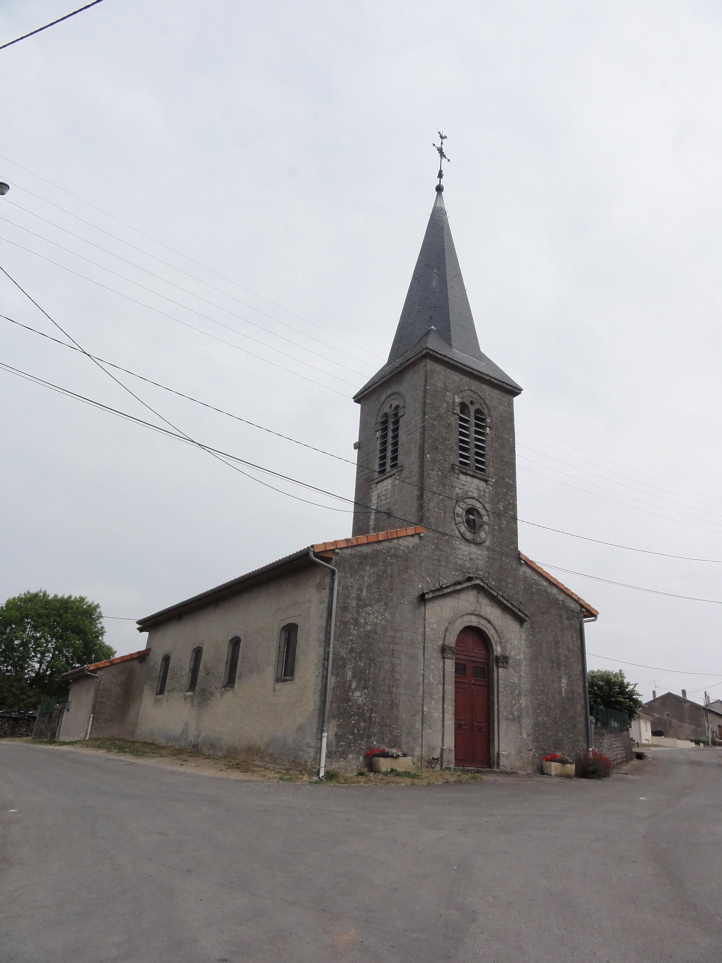 Brocourt-en-Argonne (Meuse) église